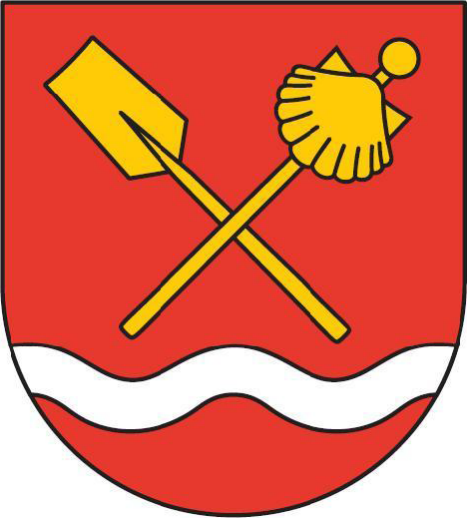 Herb gminy Waganiec